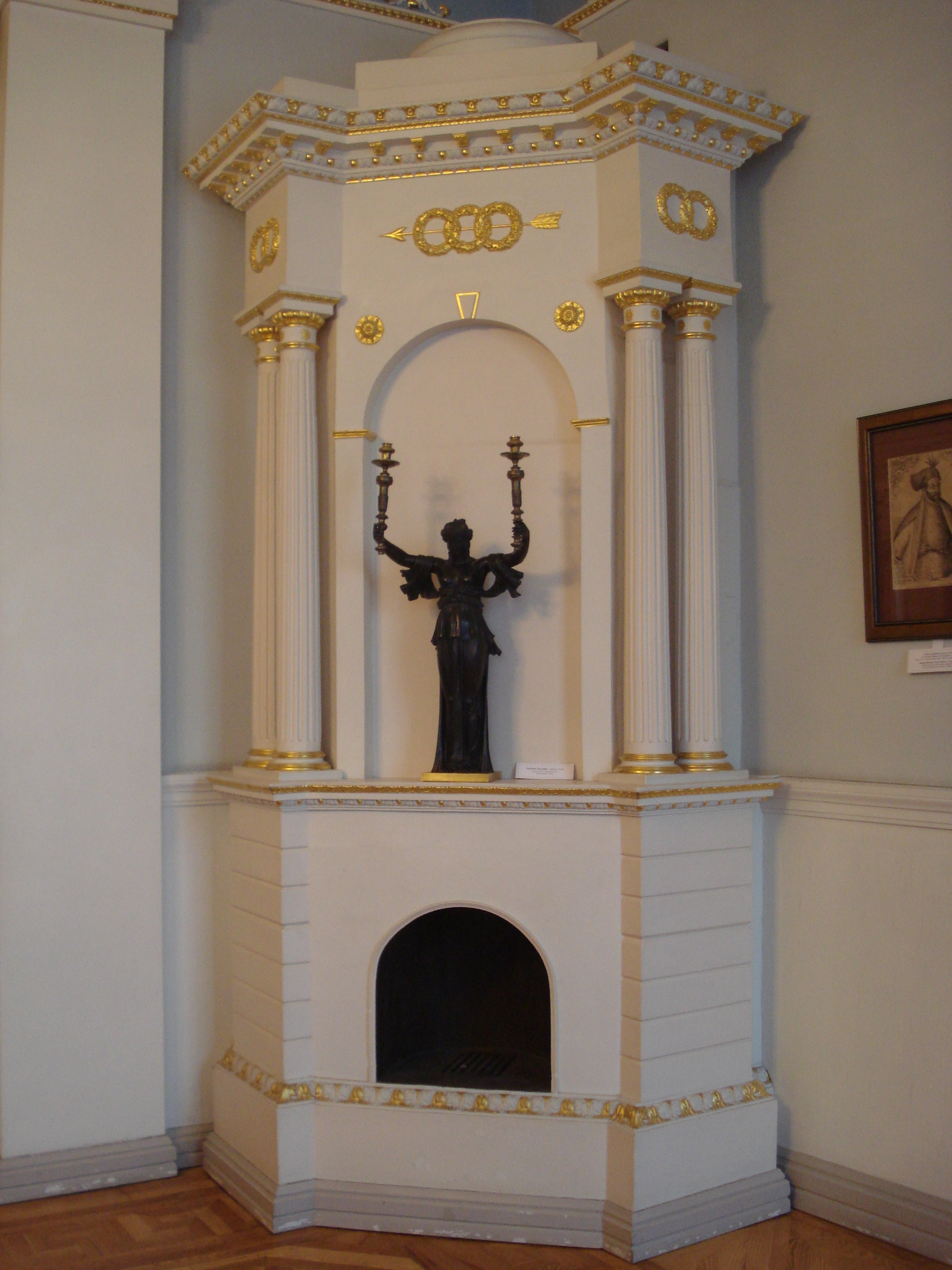 Krosnis Chodkevičių rūmuose